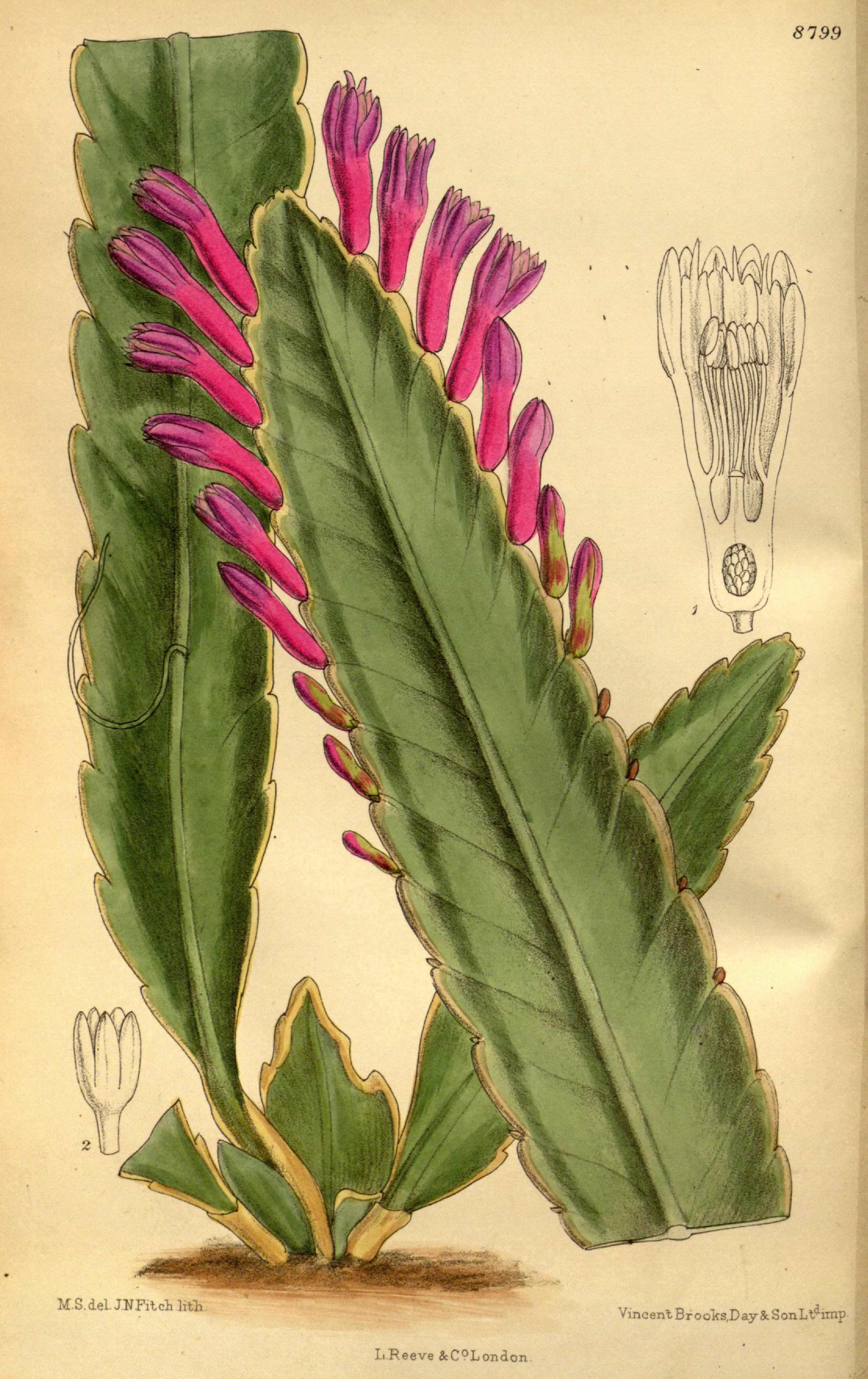 Wittia panamensis (= Pseudorhipsalis amazonica subsp. panamensis), Cactaceae